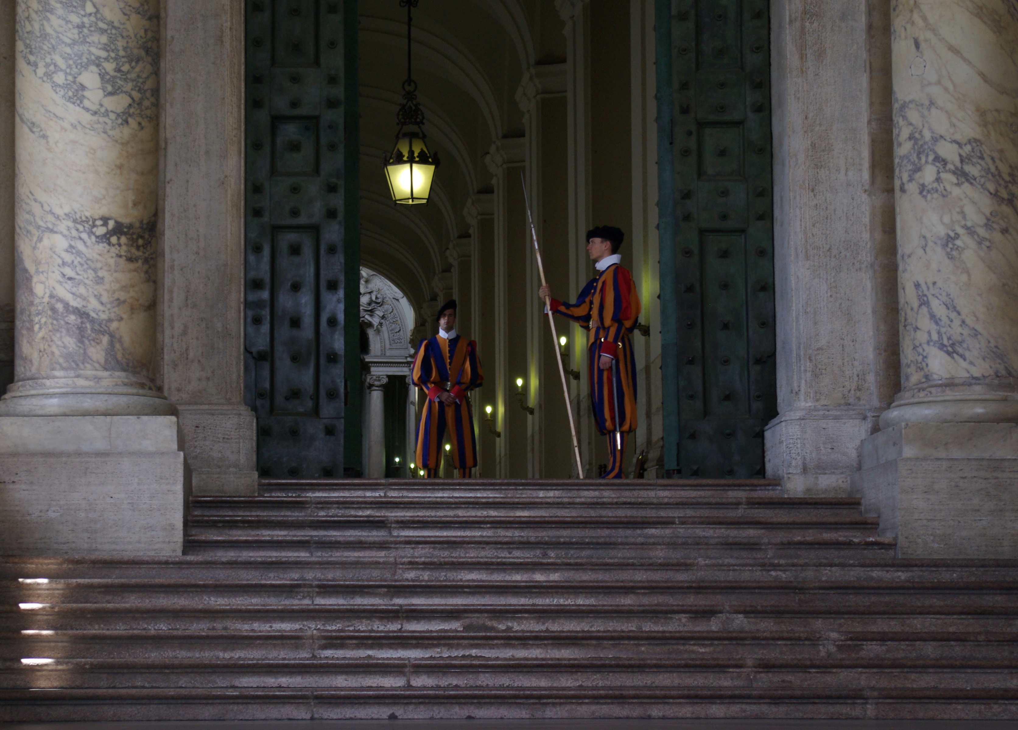 Schweizergardisten halten Wache vor dem Bronzetor